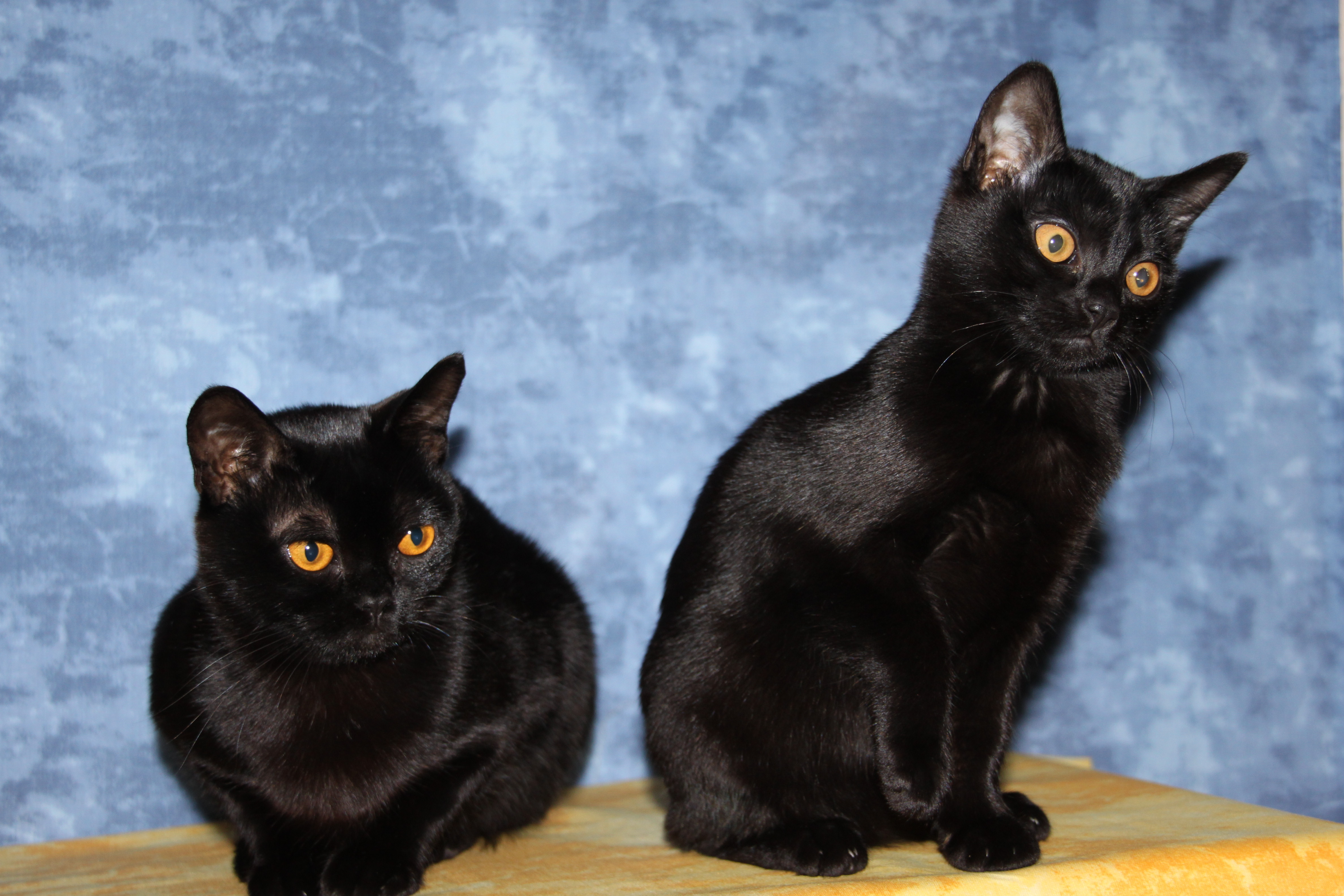 Bombay Katzen of Blue Sinfonie aus Berlin. Der Körper der Bombay ist mittelgroß und muskulös. Das feine, seidige, kurze Fell ist gleichmäßig schwarz mit wenig Unterwolle, die Pfoten sind klein und schmal mit schwarzen Ballen. Die Ohren sind mittelgroß, breit am Ansatz und sanft abgerundet an den Spitzen. Der Kopf ist rundlich mit einem vollen Gesicht. Die Augen sind rund , weit auseinanderstehend mit einem Farbton der zwischen Gold und bevorzugten leuchtenden Kupfers liegt.